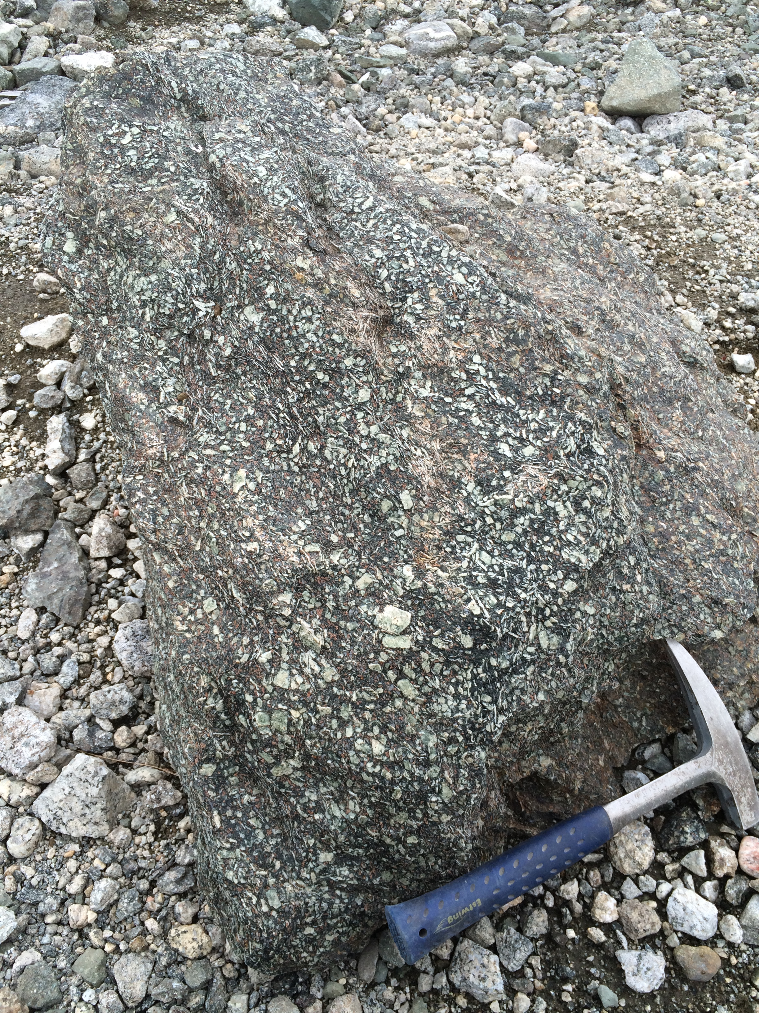 Ловозёрские тундры